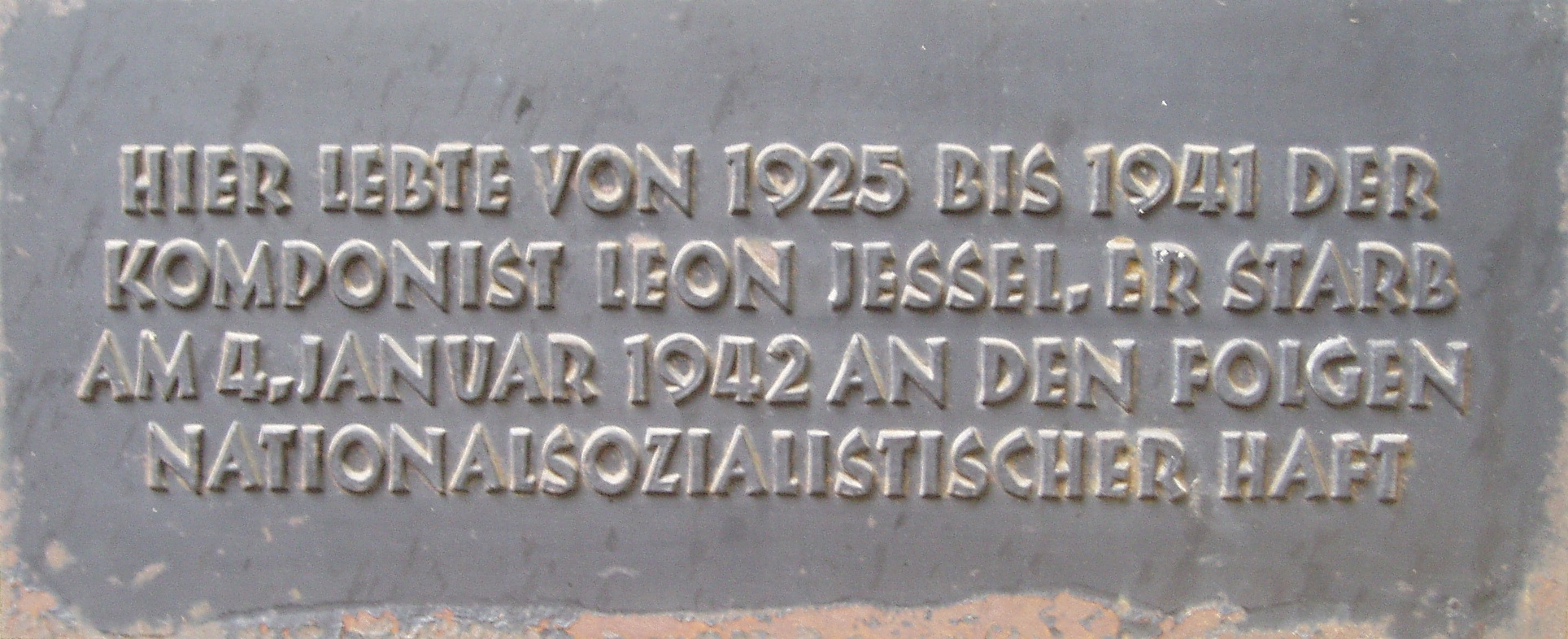 Gedenktafel für Leon Jessel, 10707 Berlin, Düsseldorfer Straße 47